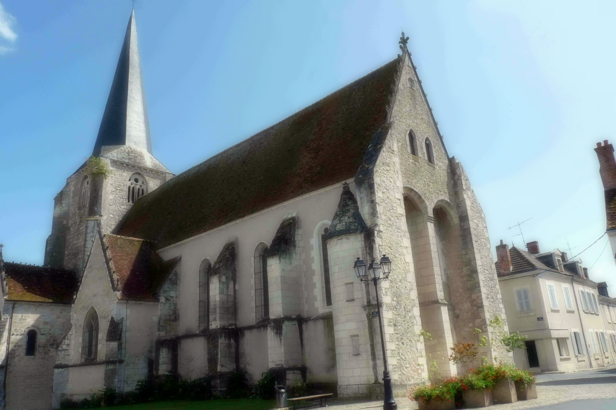 Eglise de Chabris